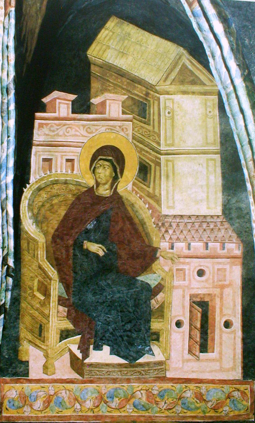 Фрэска ў замкавай капліцы ў Любліне